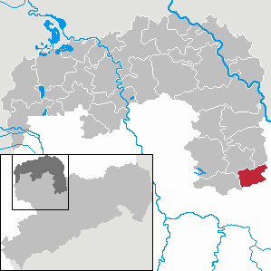 Naundorf in Saxony - Landkreis Nordsachsen